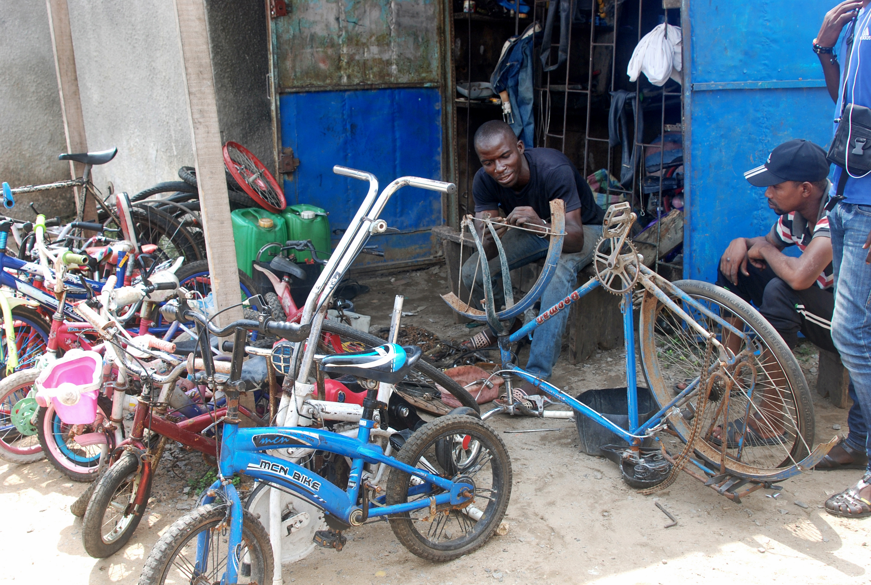 réparateur de bicyclettes dans la ville d'Abidjan This is an image of "African people at work" from Ivory Coast